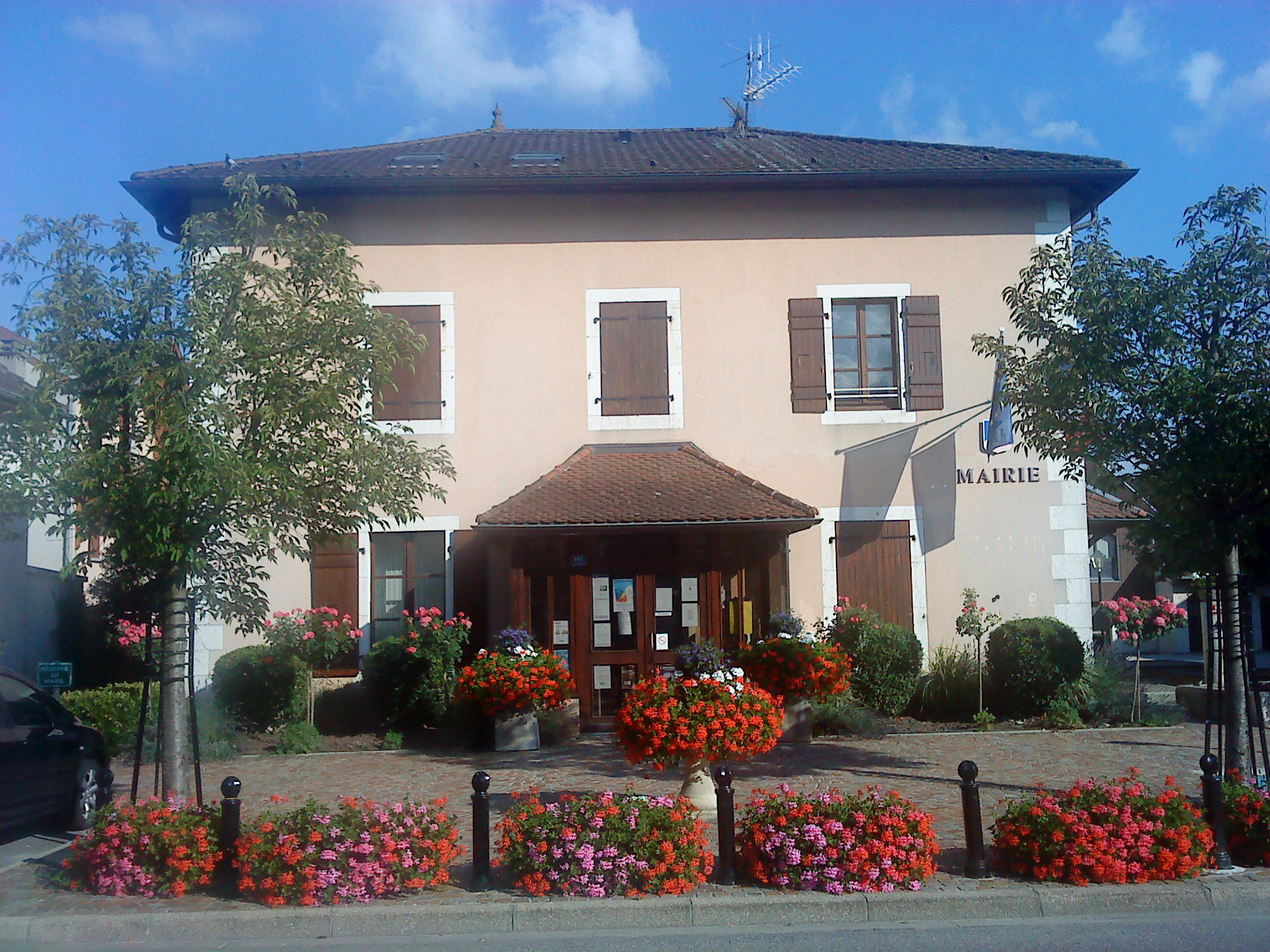 Mairie de Segny (Ségny), Ain, France